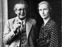 Valentine et Jean Piaget lors d’une conférence du Bureau international d’éducation en 1932.